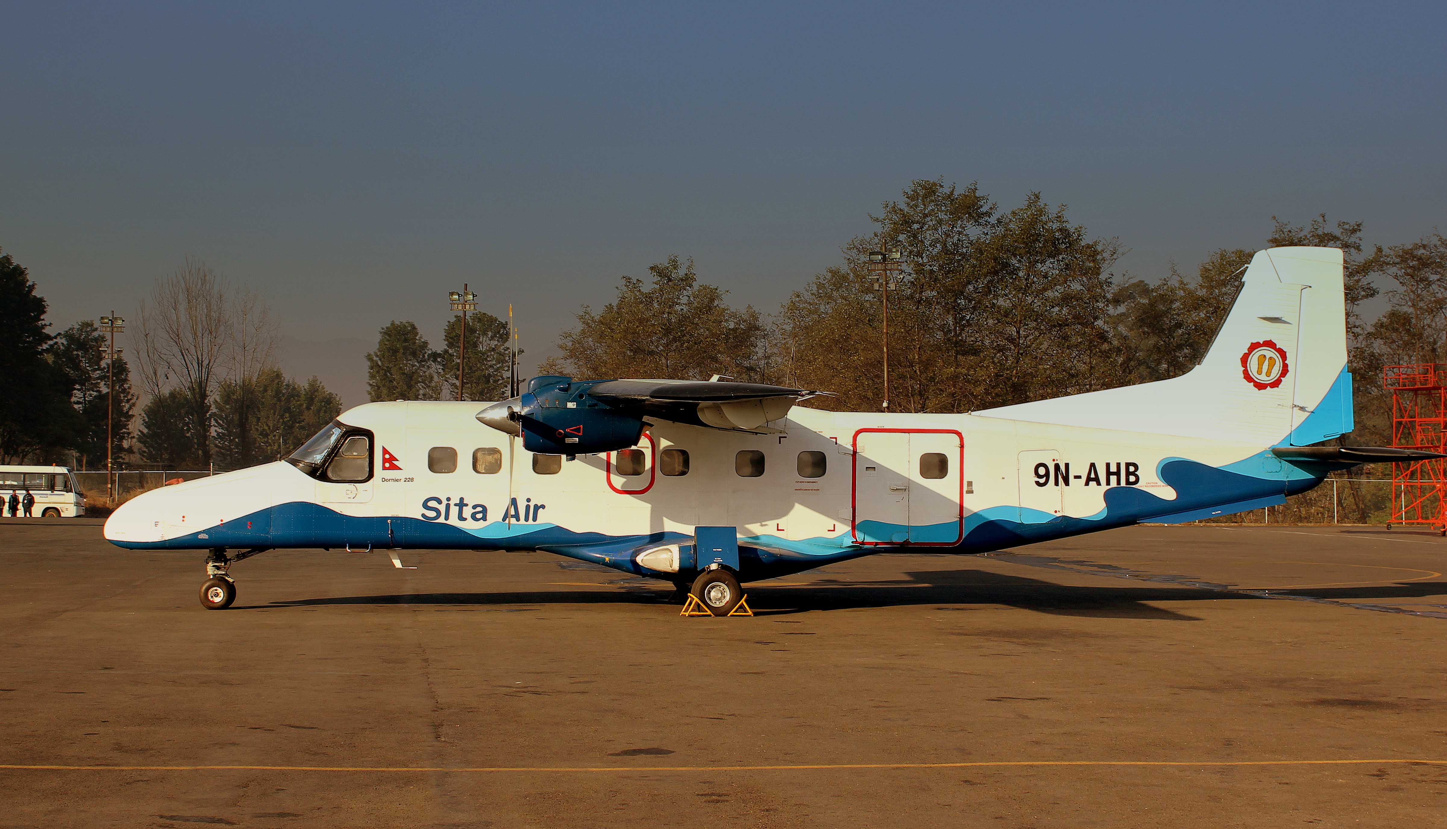 SITA AIR DORNIER 228 9N-AHB AT KATHMANDU TRIBHUVAN AIRPORT NEPAL FEB 2013